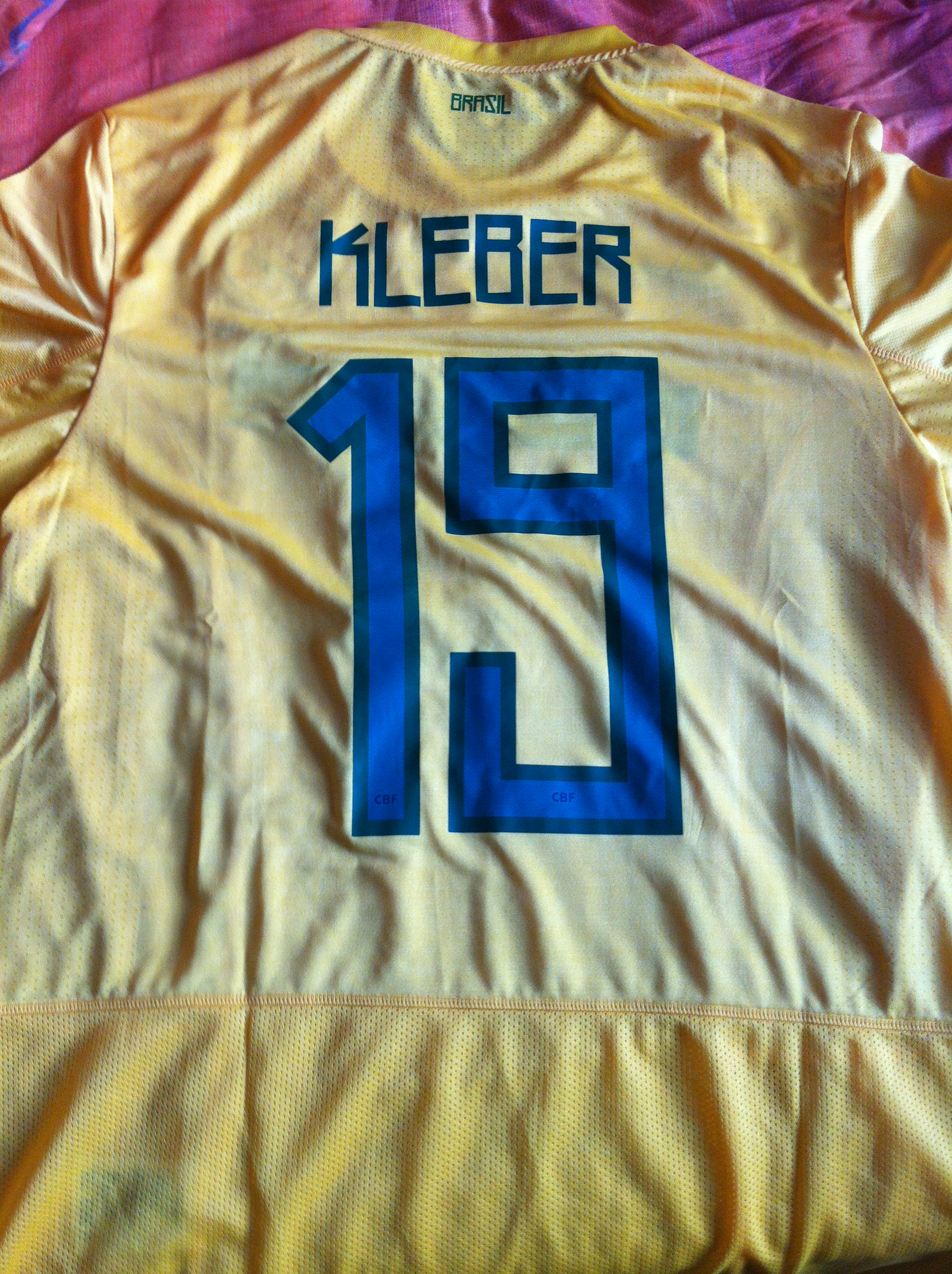 MAILLOT PORTER DE KLEBER Laude Pinheiro